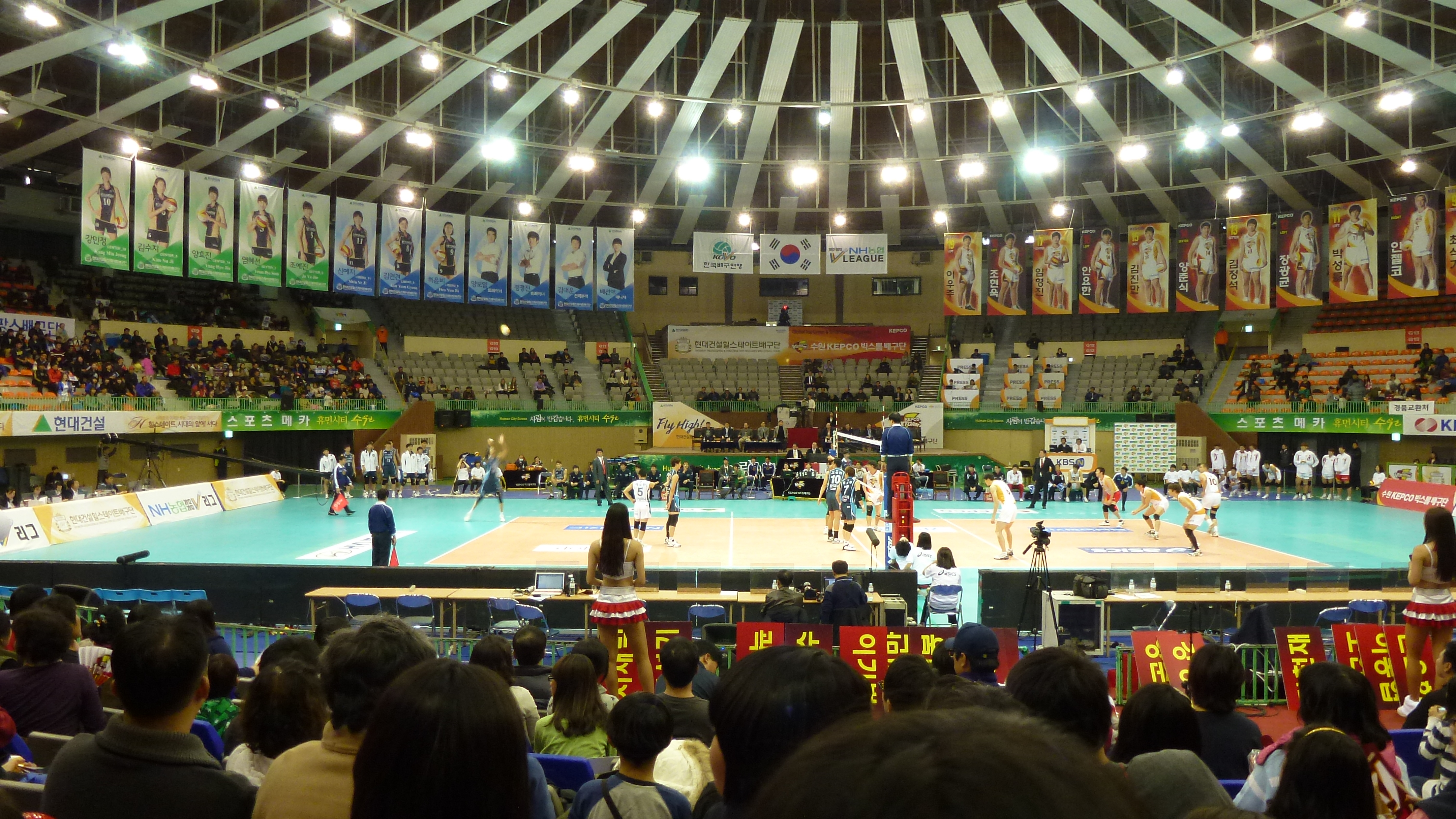 수원체육관, NH농협 V-리그 KEPCO와 삼성화재의 11월 24일 경기 모습